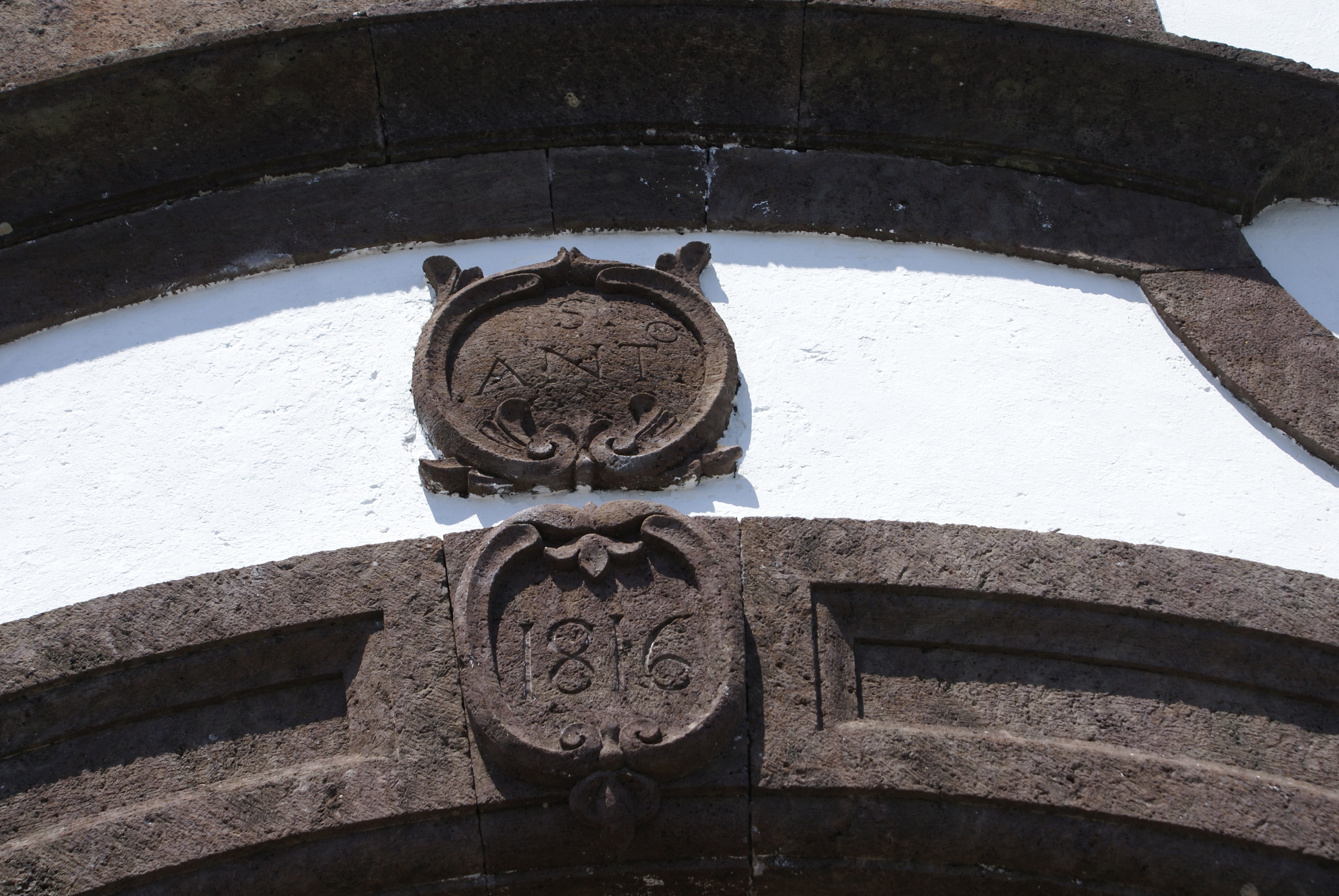 Ermida de Santo António, calheta, ilha de São Jorge, Açores